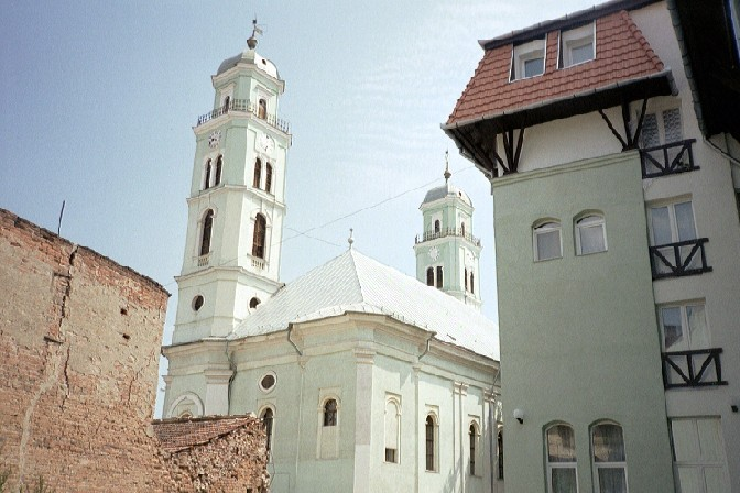 persona foto, neniu kopirajto